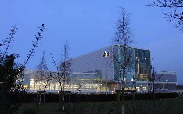 z Druckzentrum